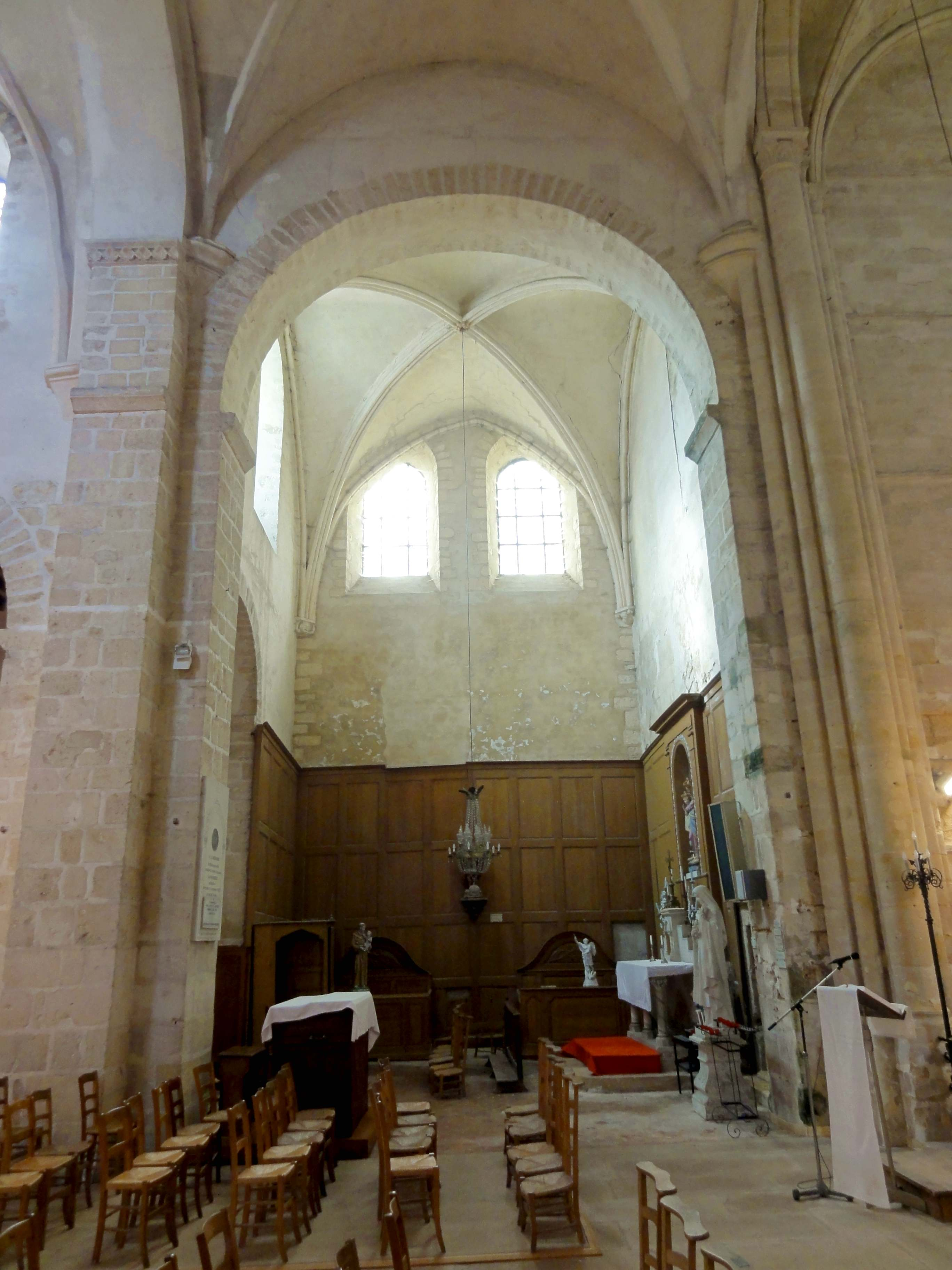 Intérieur de l'église - voir titre.